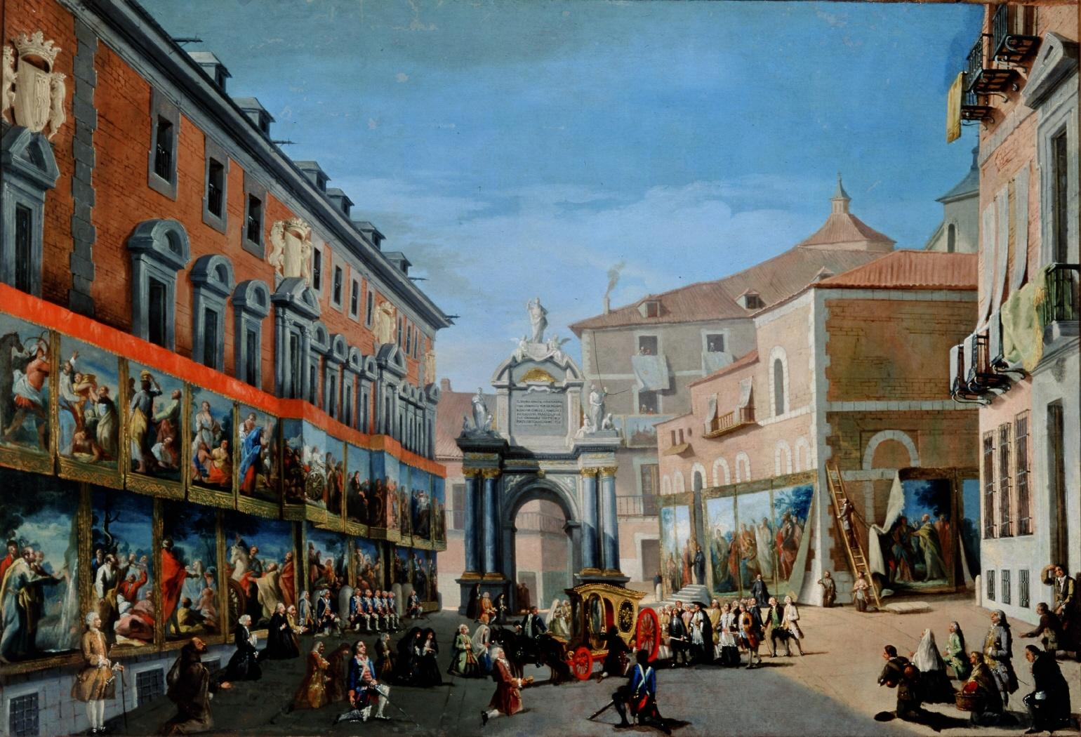 El lienzo representa el arco de triunfo que se alzó en la calle Mayor de Madrid con motivo de la entrada en Madrid del rey Carlos III, que sucedió como rey de España a su hermanastro Fernando VI.